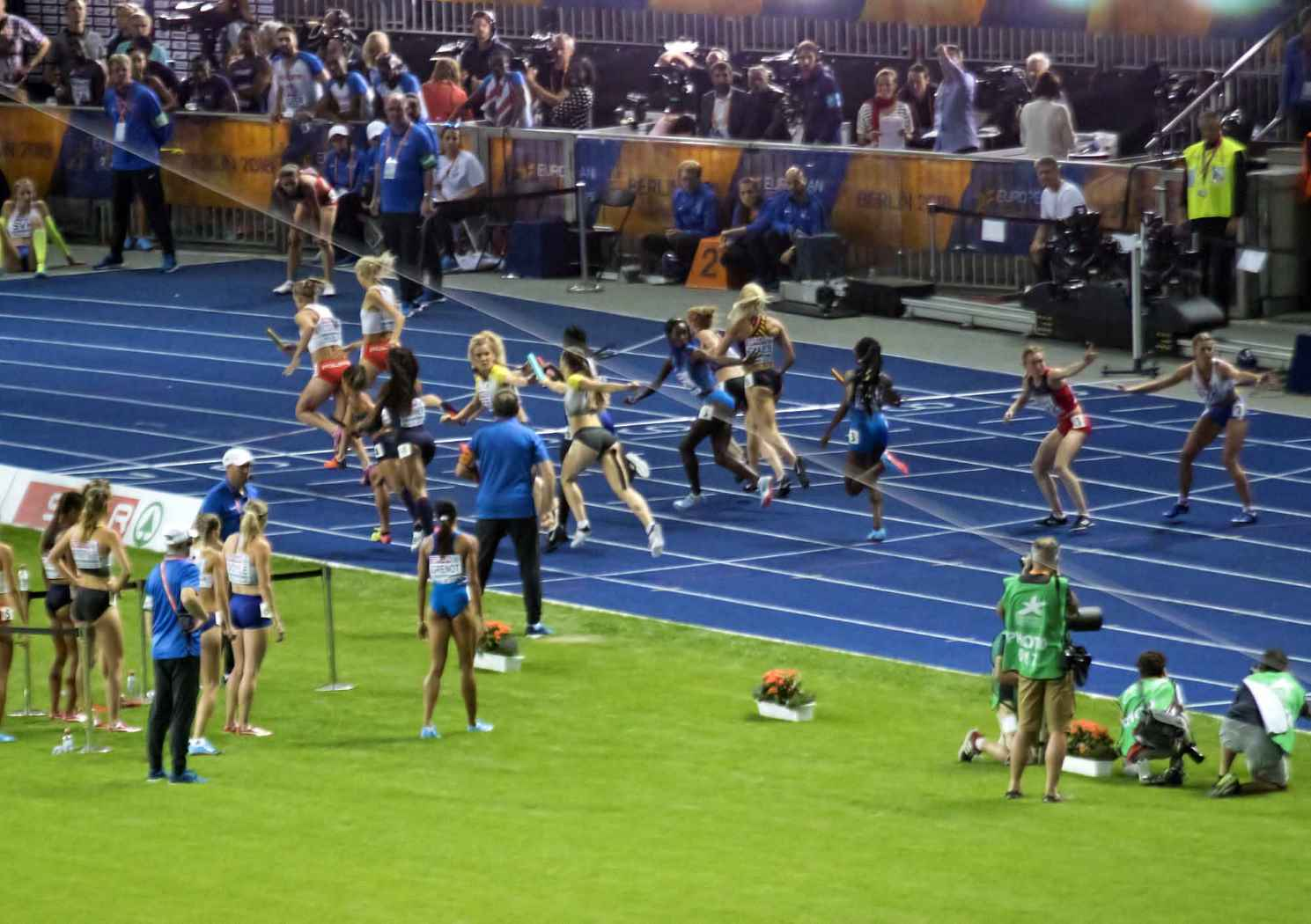 EKB42728 4x400m dames claes grillet